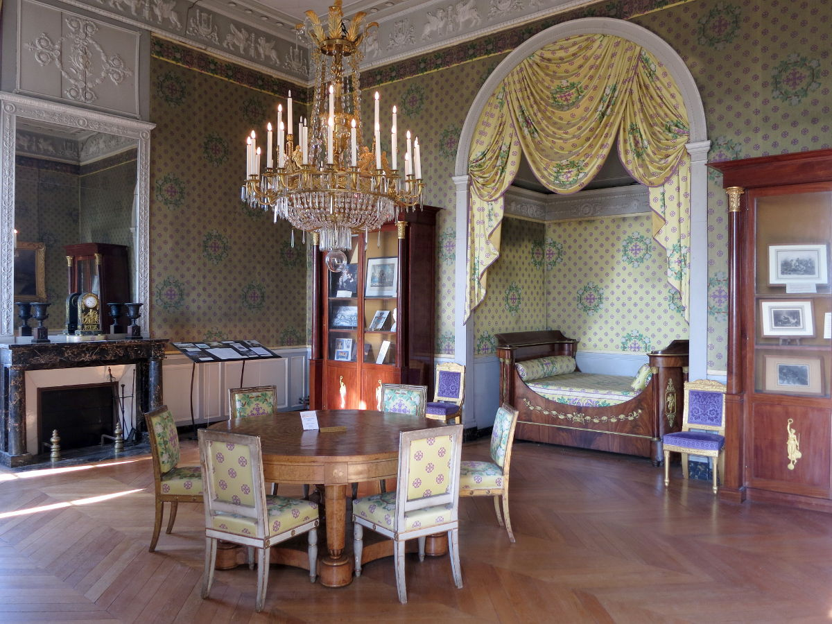 Château de Maisons-Laffitte, chambre du maréchal Lannes, mobilier et décor style Empire